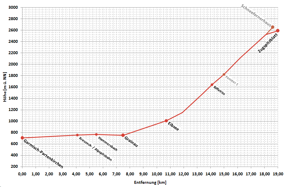 vereinfachtes Höhenprofil der Bayerischen Zugspitzbahn